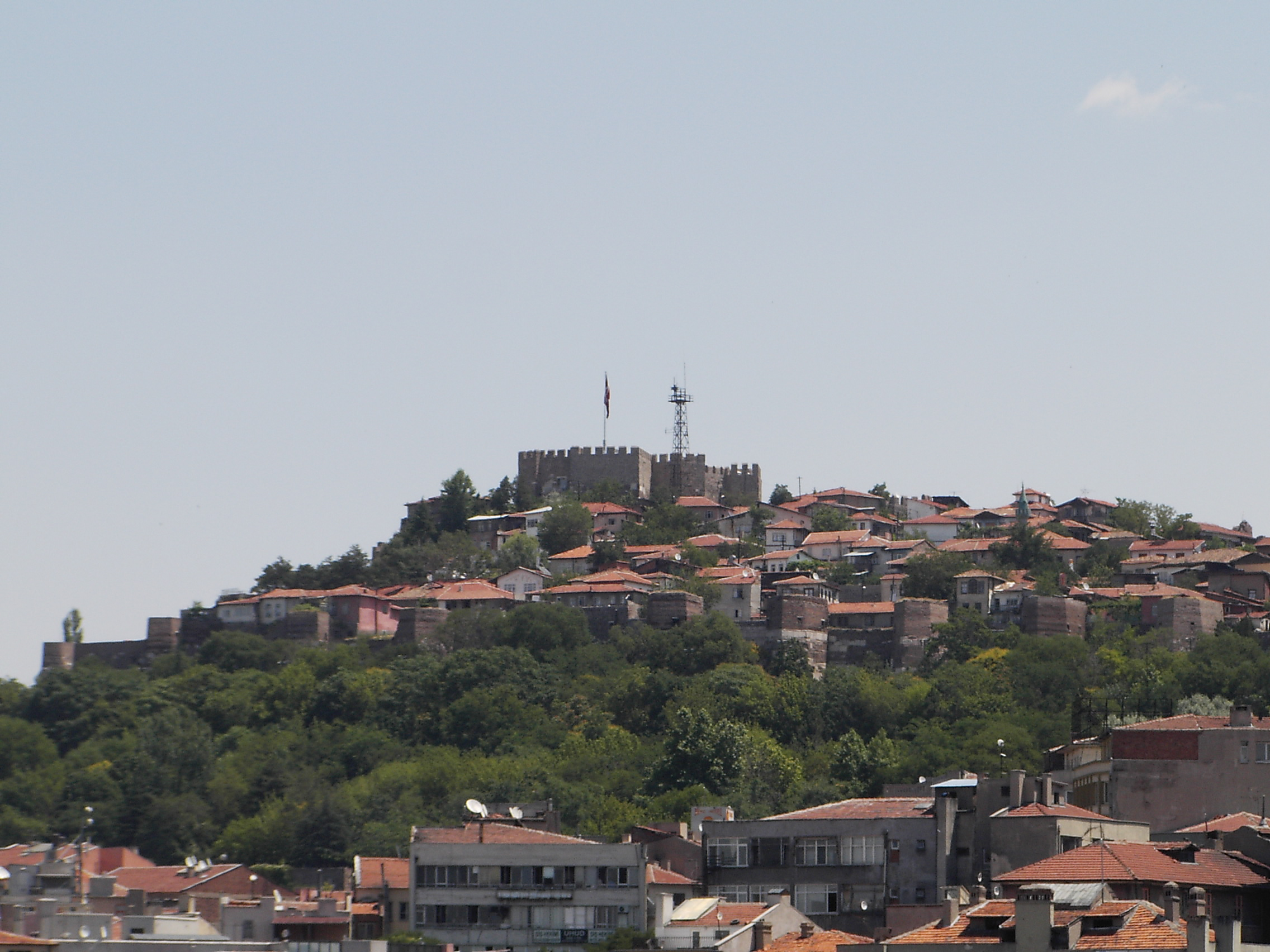 Fotoğrafı ben çektim.